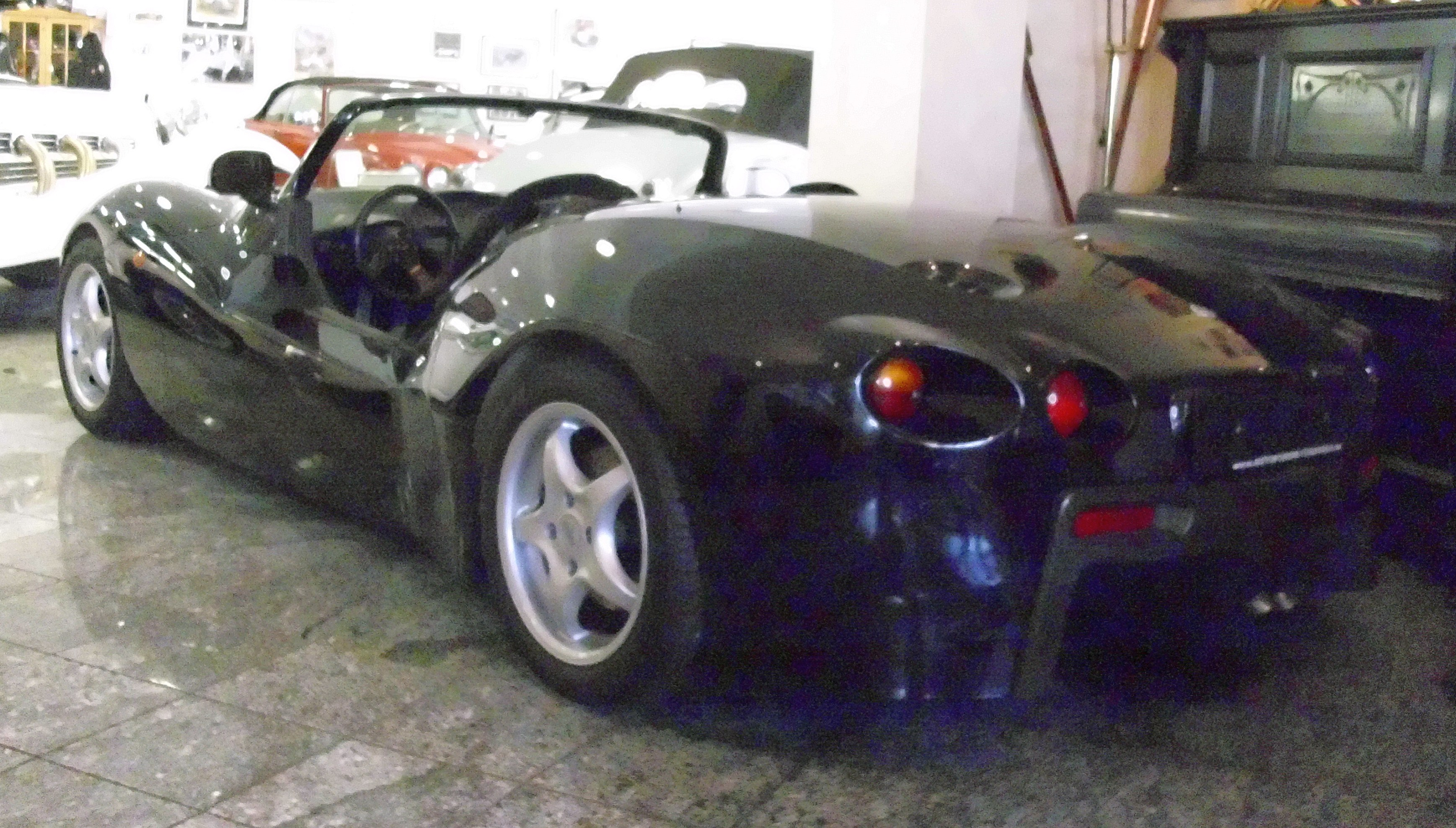 Zato L 3 S 2006